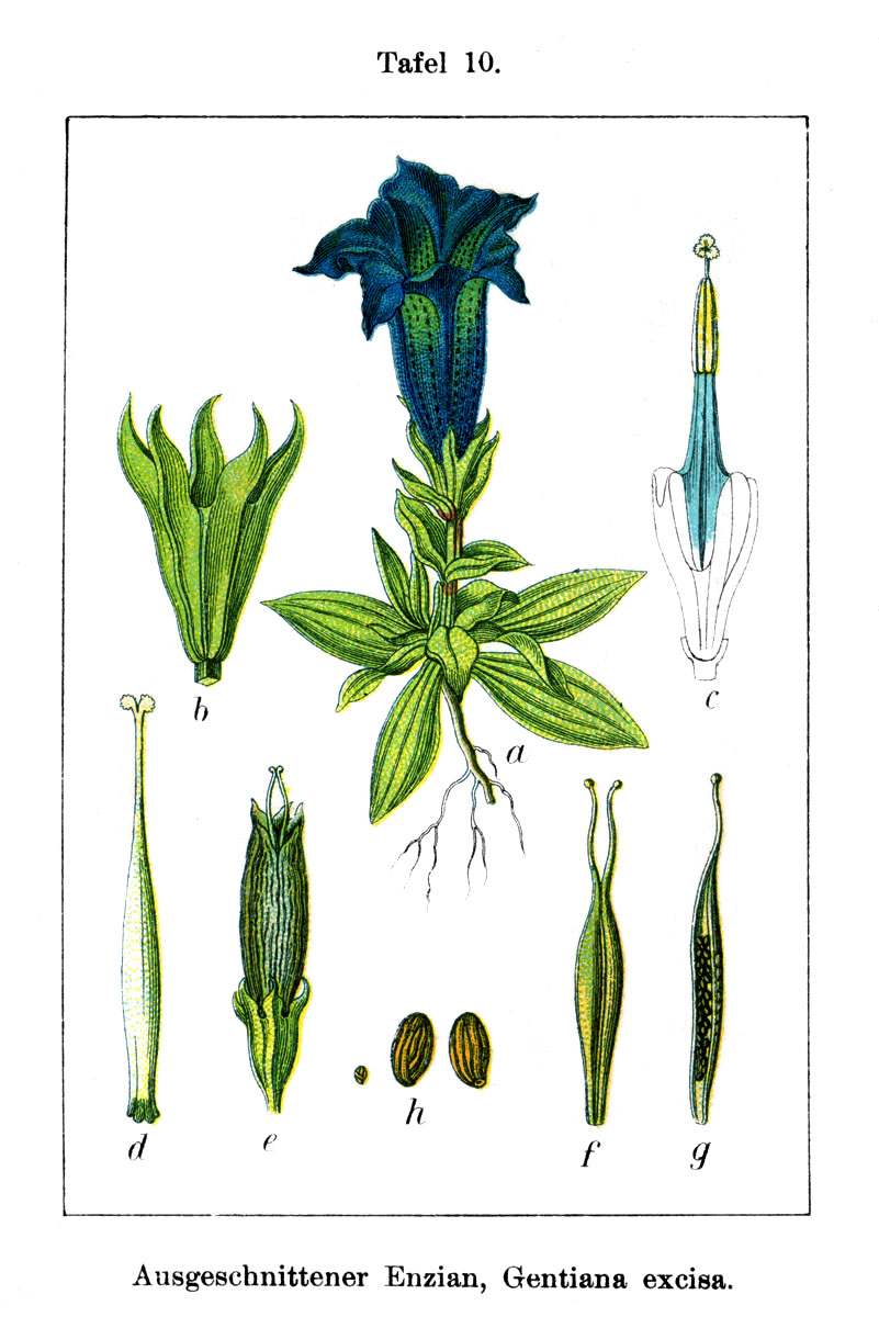 Gentiana acaulis var. acaulis, syn. Gentiana excisa C.Presl Original Caption Ausgeschnittener Enzian, Gentiana excisa